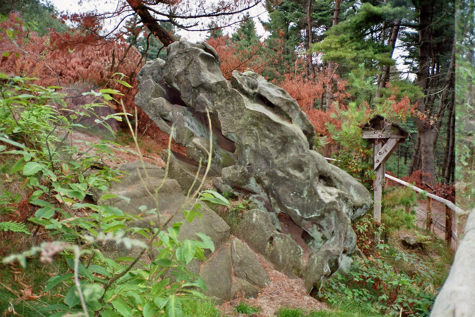 Felsformationen aus Schwartensandstein in der Haard